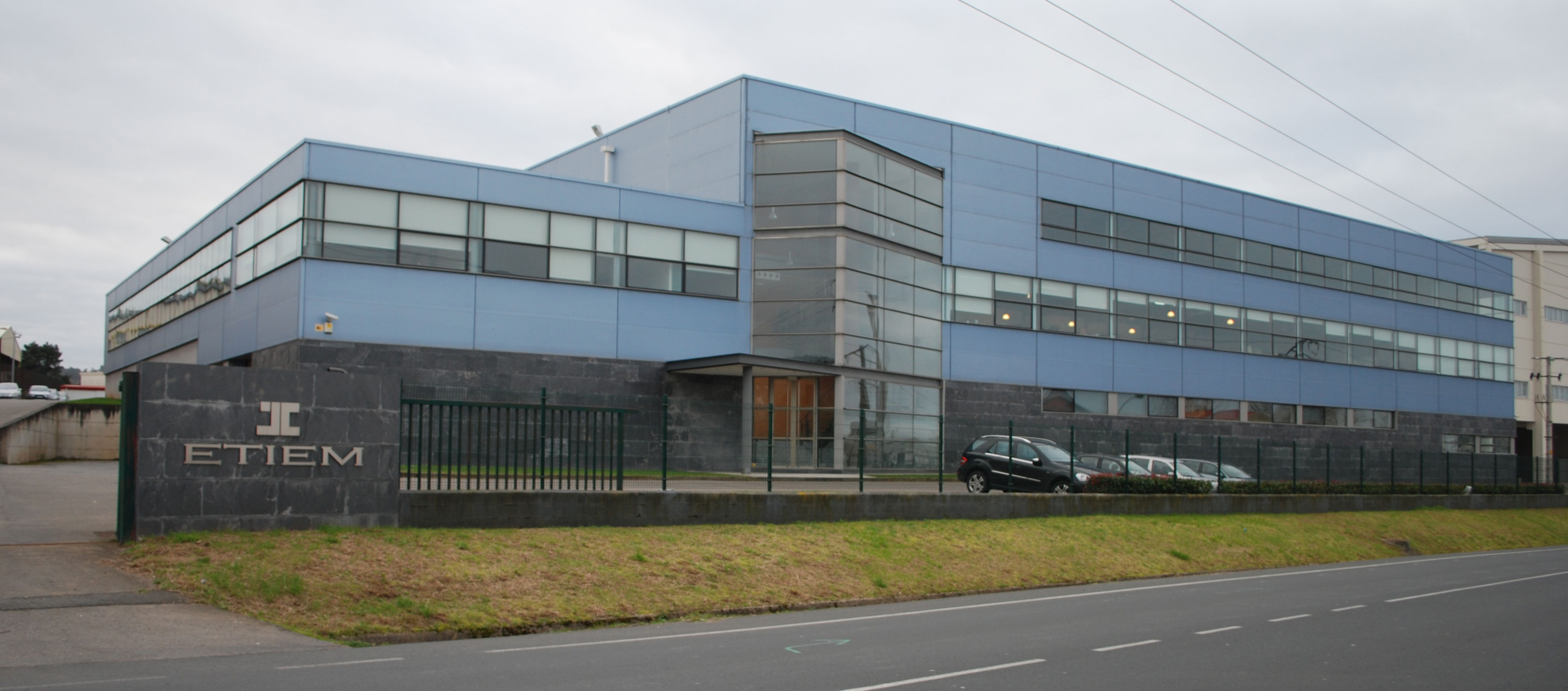 Sede de Etiem Textil SL Polígono de Sabón Arteixo A Coruña Galliza Spain